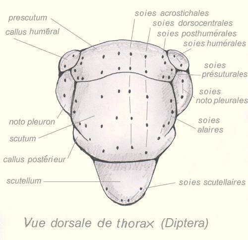 Vue dorsale d'un thorax de diptère